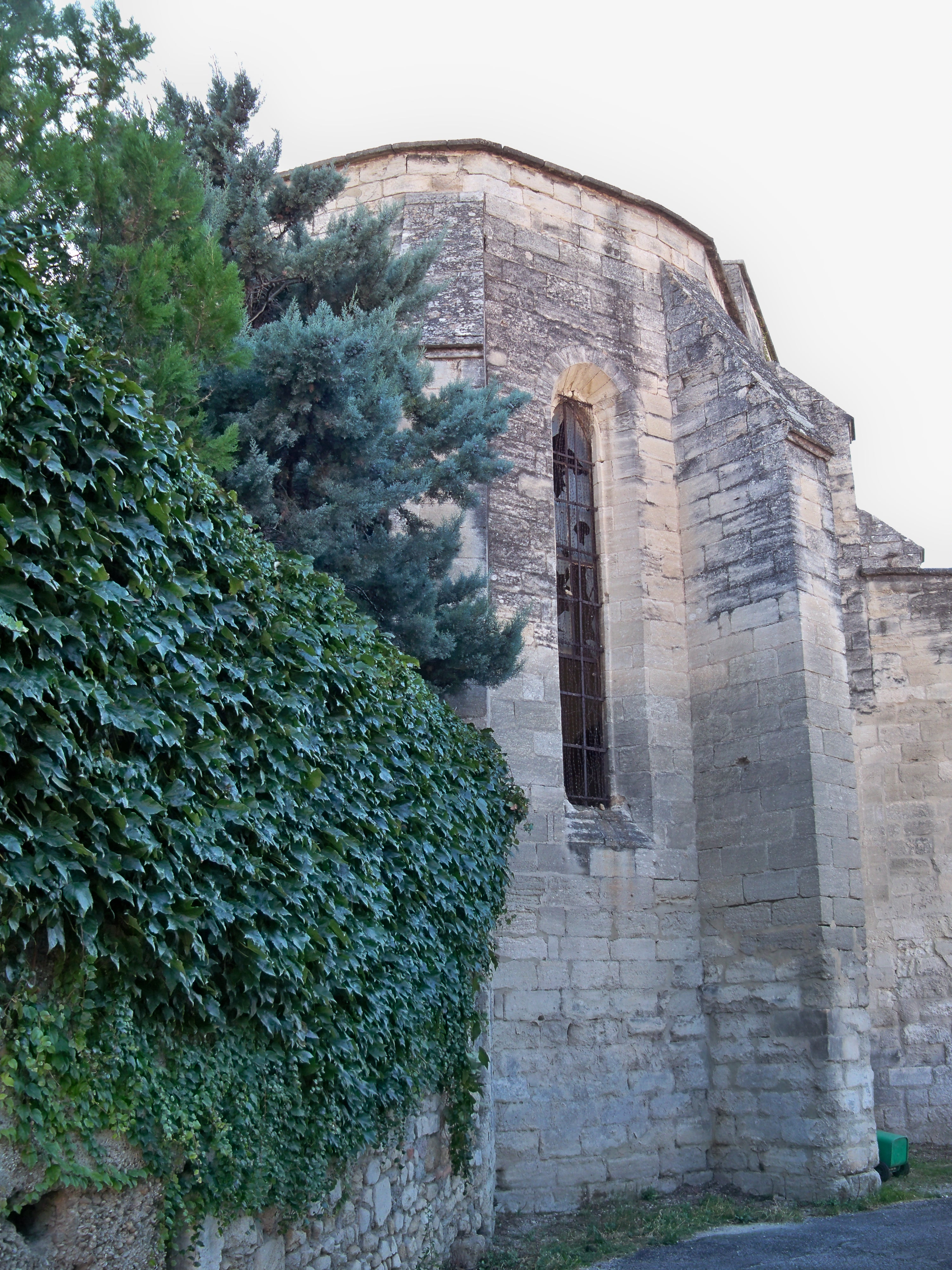 Couvent de Saint-Véranchapelle (classée)